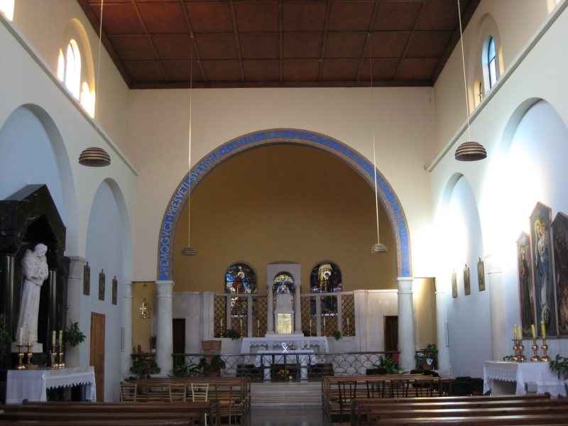 Unutrašnjost crkve Svetog Antuna, Crikvenica, Croatia